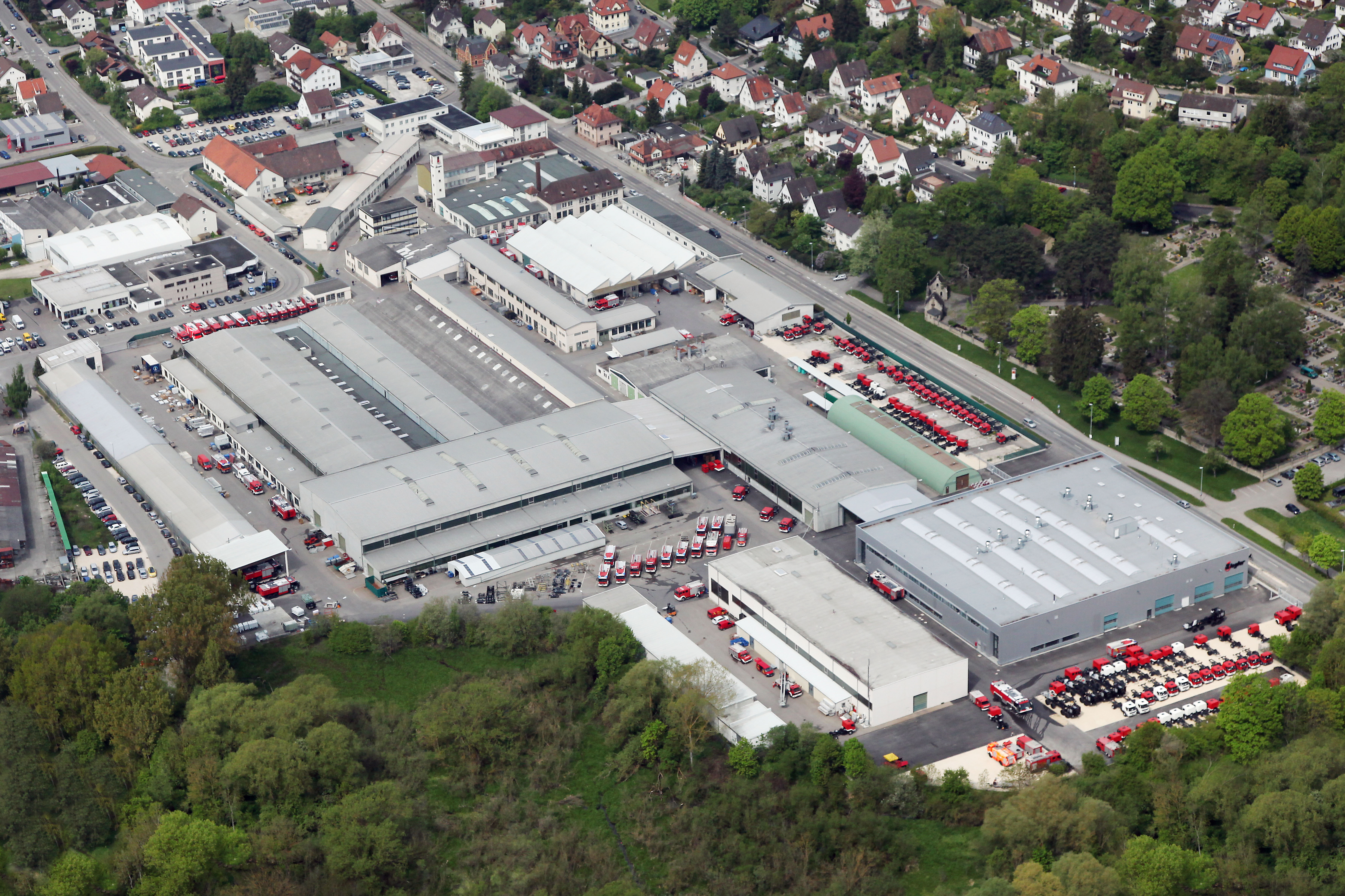 Luftaufnahme Firma Albert Ziegler GmbH